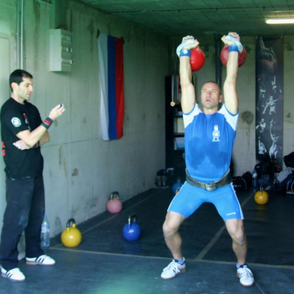 Sport